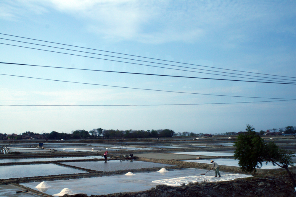 Ladang garam yang berada di tepi jalan Pantura Juwana-Rembang Jawa Tengah Indonesia